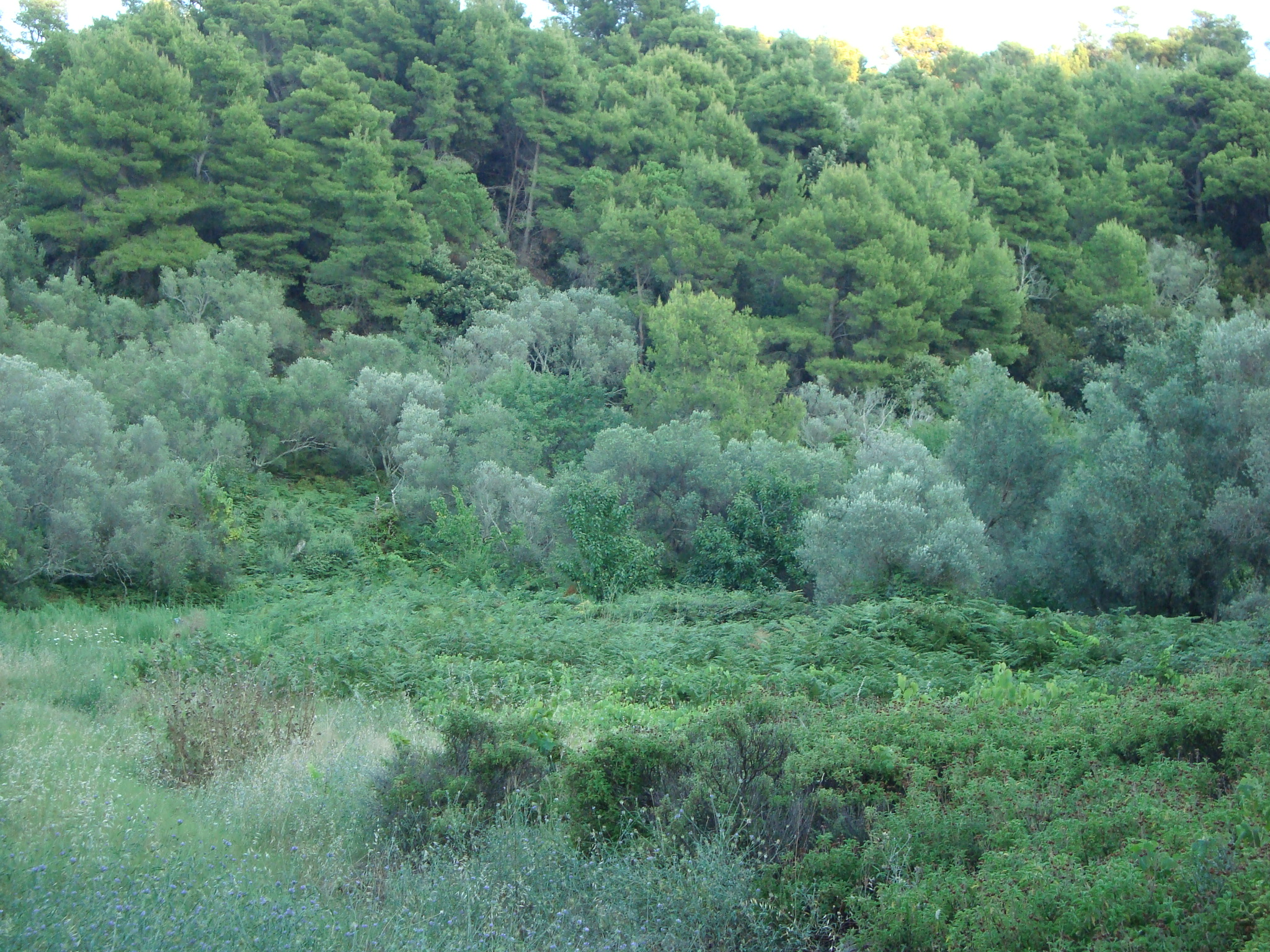 Žara, polje gdje je nekoć bilo rimsko, ali i slavensko istoimeno naselje